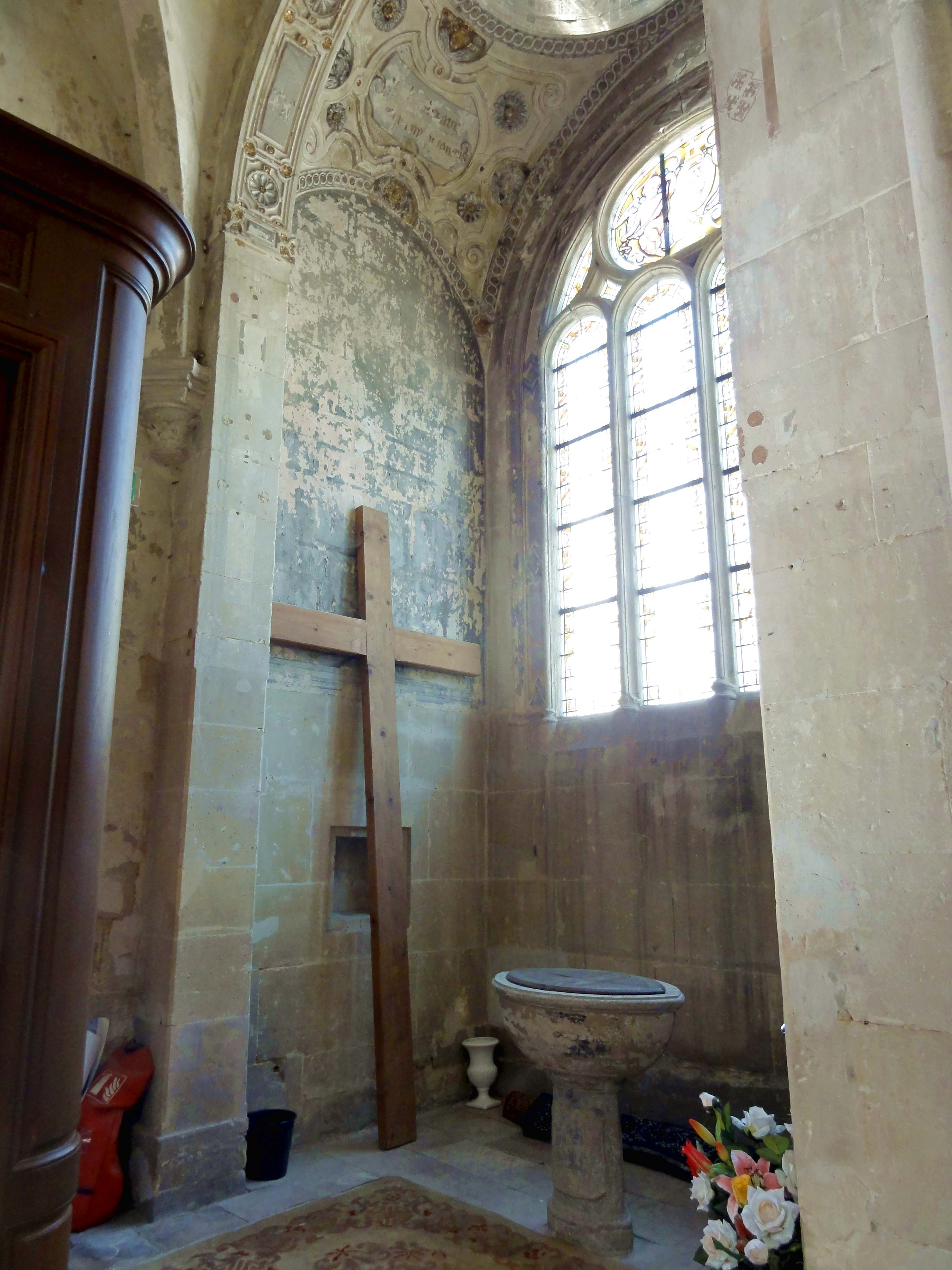 Voir titre.